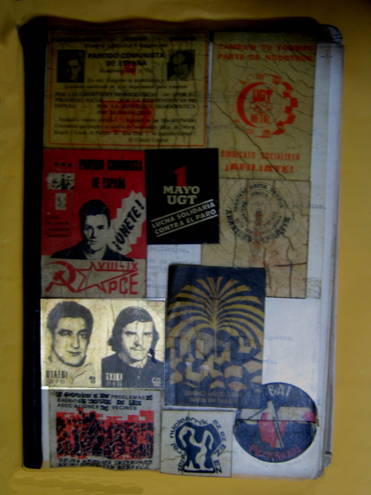 Carperta con pegatinas de la década de los años 80 del siglo XX, resaltada la correspondiente a Txiki y Otaegi.